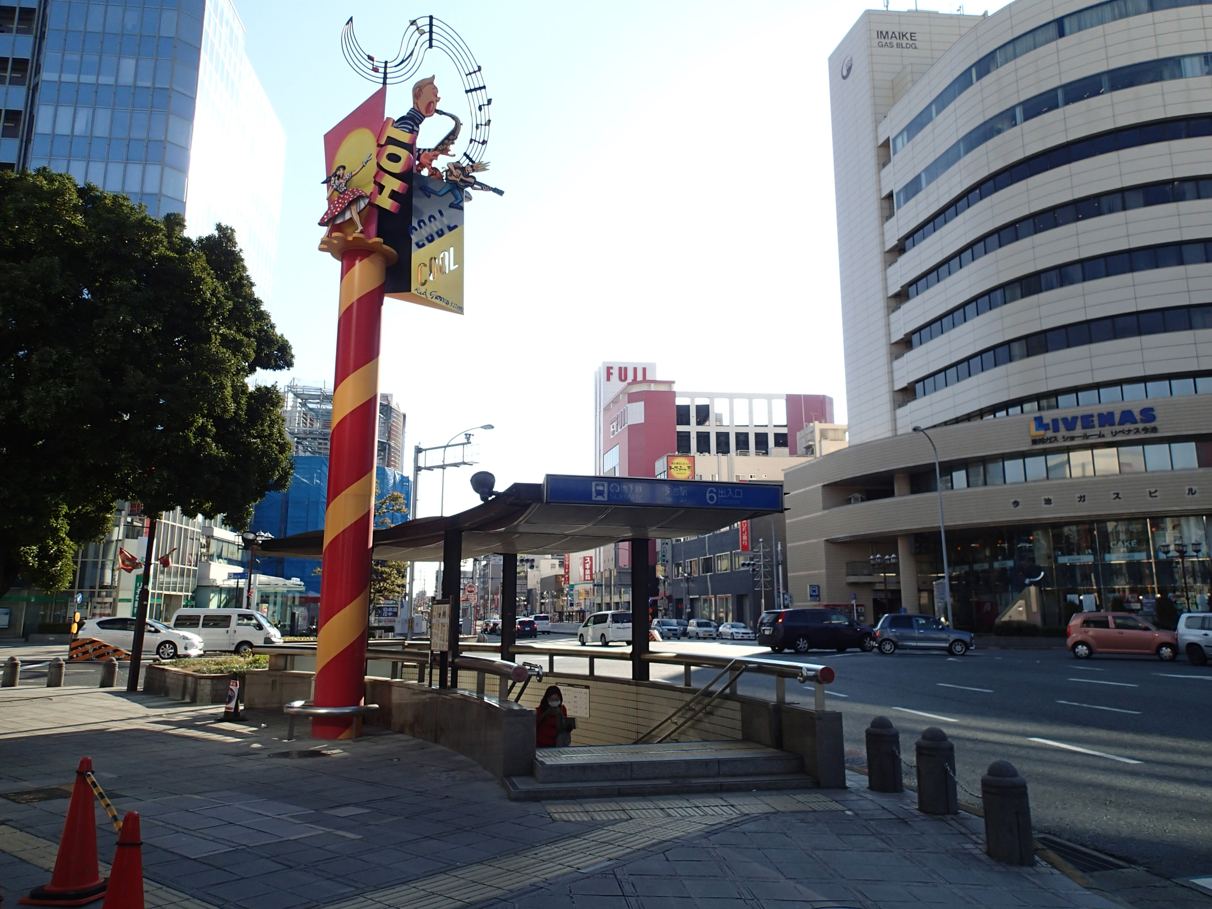 2014年1月26日撮影